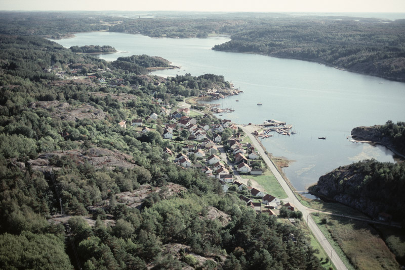 Bilden är tagen mot (väderstreck): SSO Motiv: Sannäs Nyckelord: Flygbilder, Riksintressen Kategori: Skärgårdsby, FiskelägeBilden är tagen mot (väderstreck): SSO.